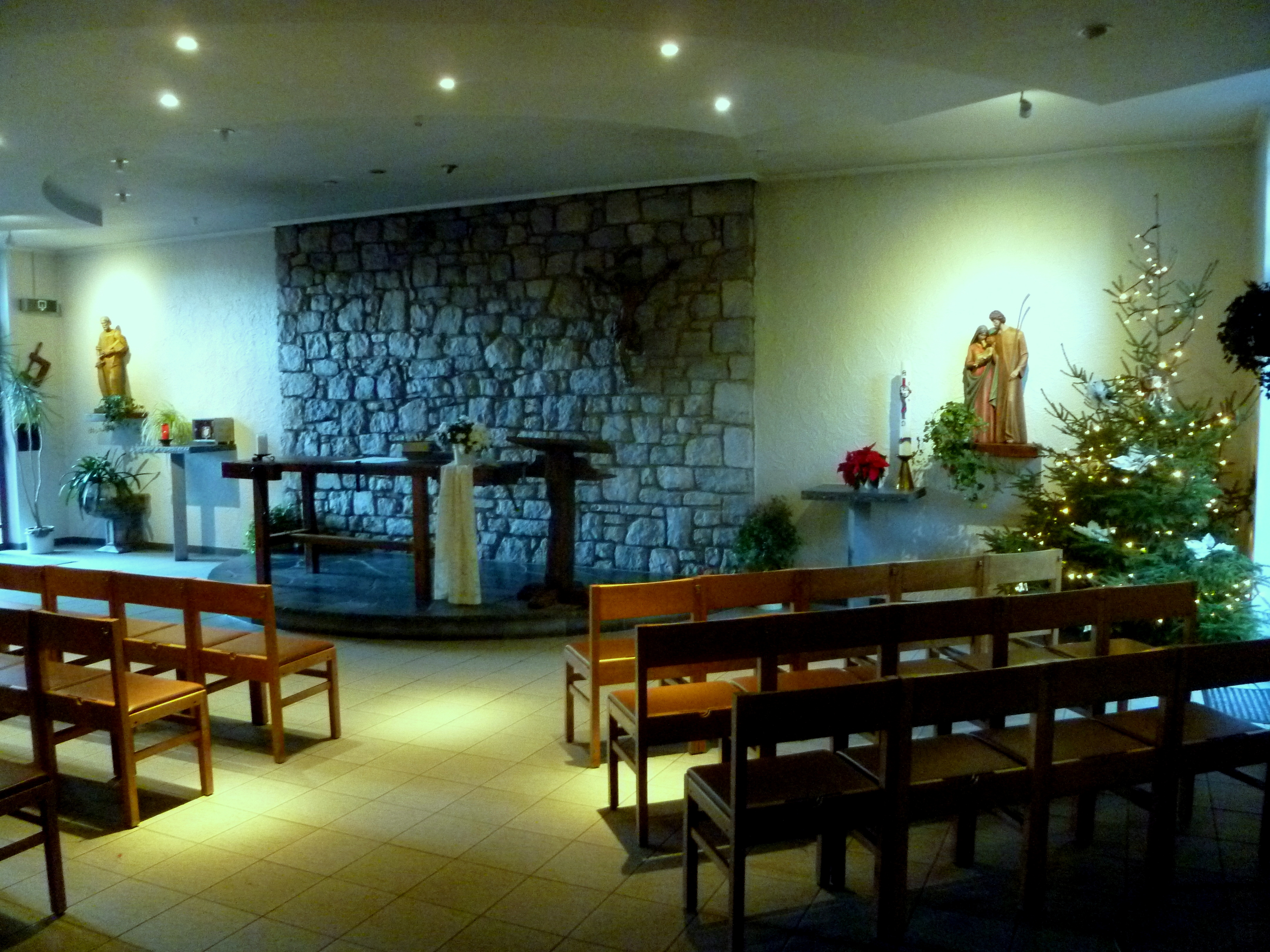 Wochentagskapelle in der Kirche St. Josef in Eupen